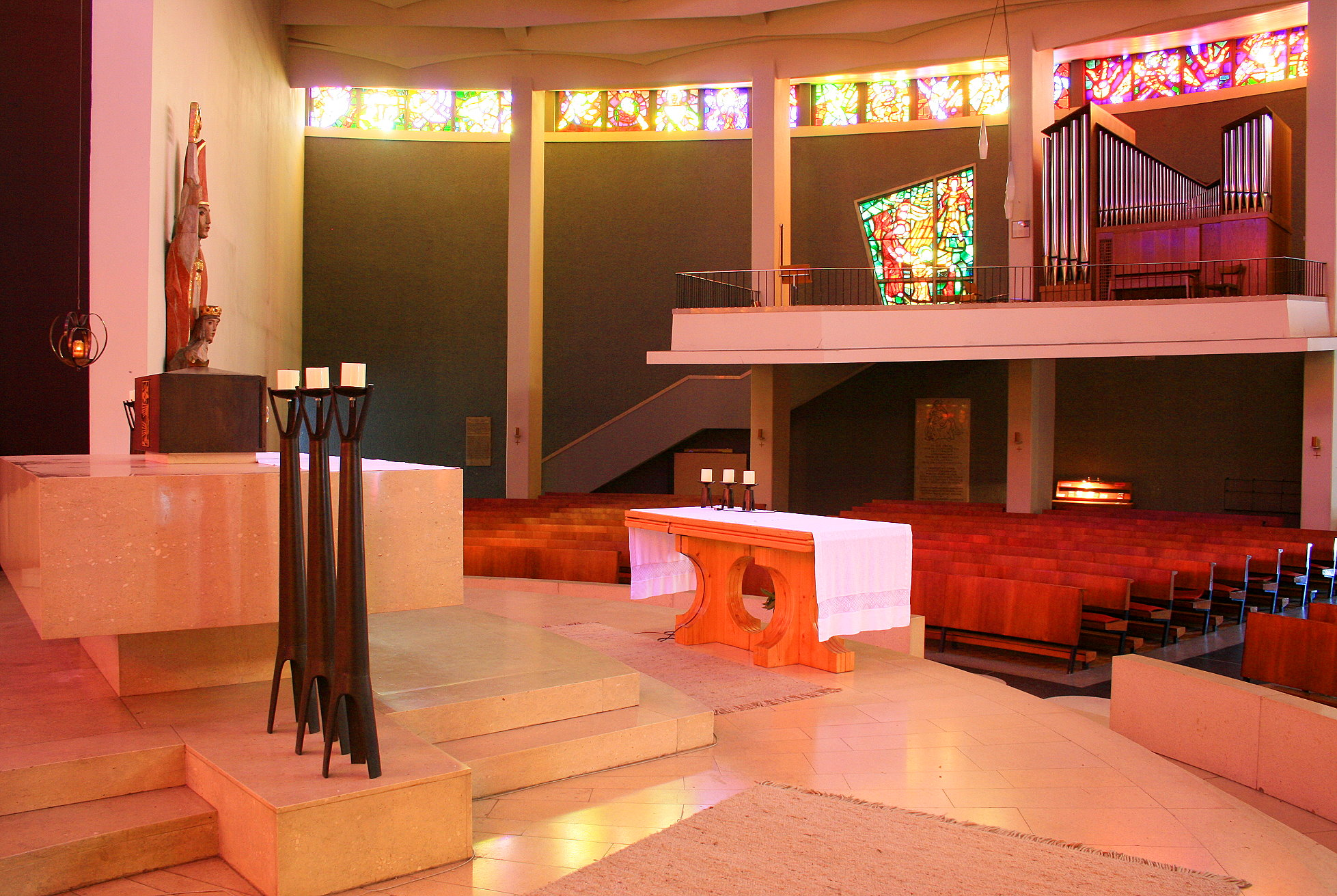 Kath. Pfarrkirche Gottessiedlung zur hl. Erentrudis in Herrenau mit Kloster